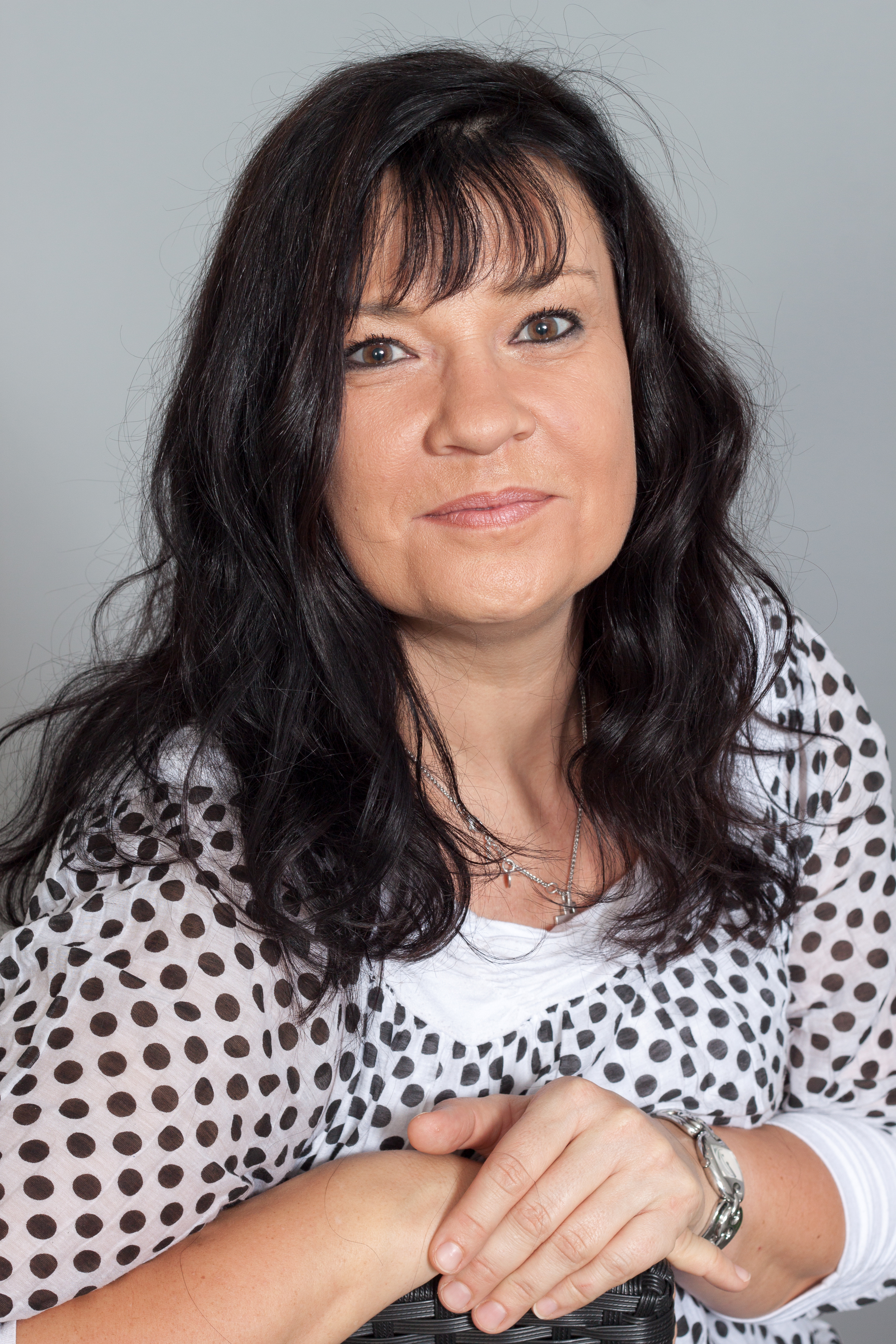 Abgeordnete des Sächsischen Landtages Ines Saborowski-Richter